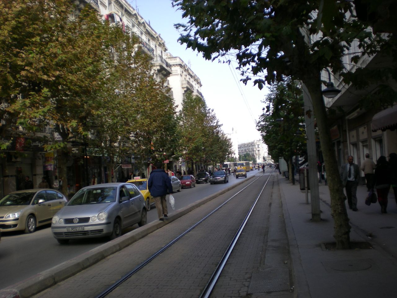 Rue Habib Thameur, Tunis, Tunisie